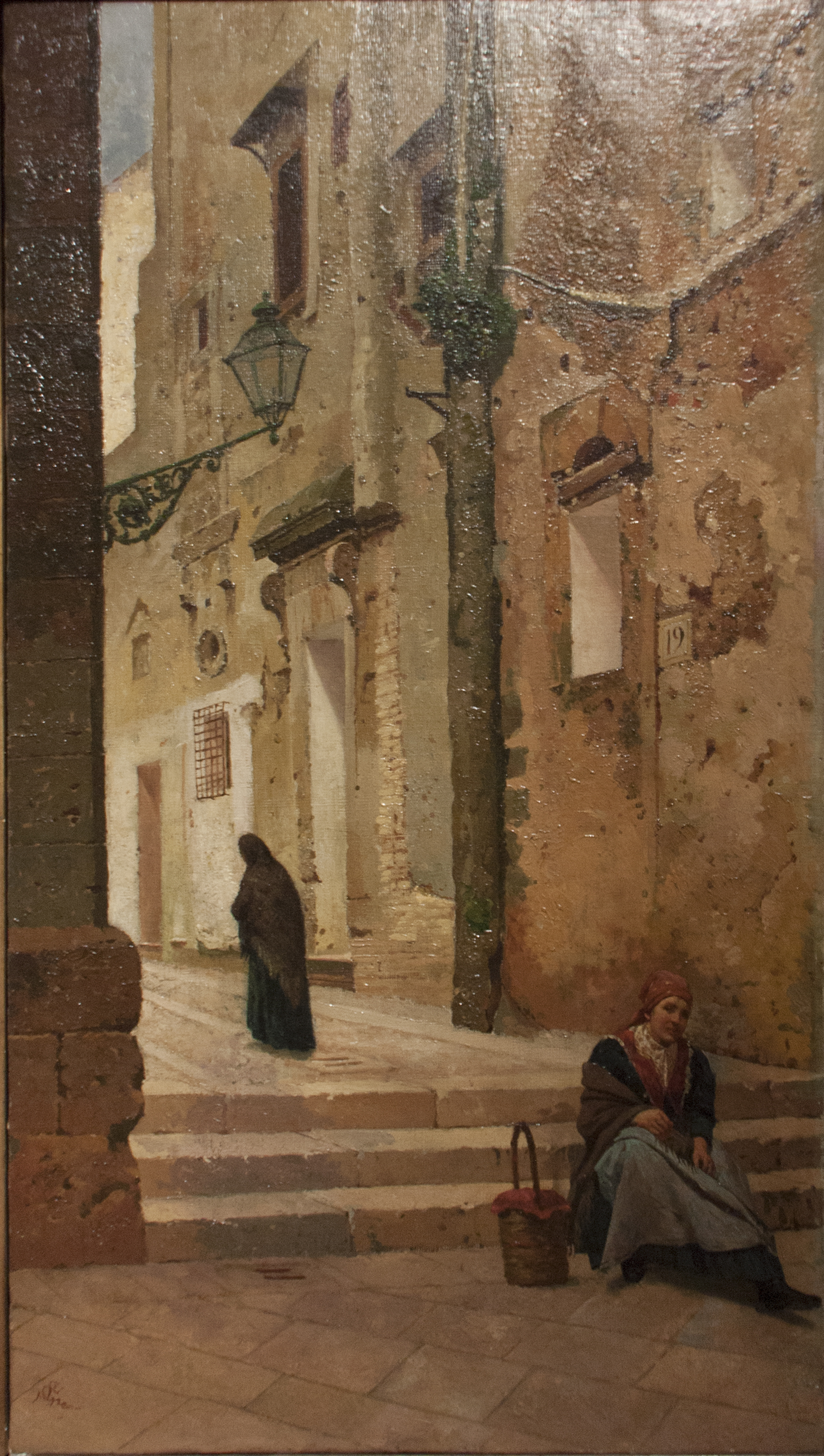 Vicolo palermitano - Salvatore Gregorietti 1898